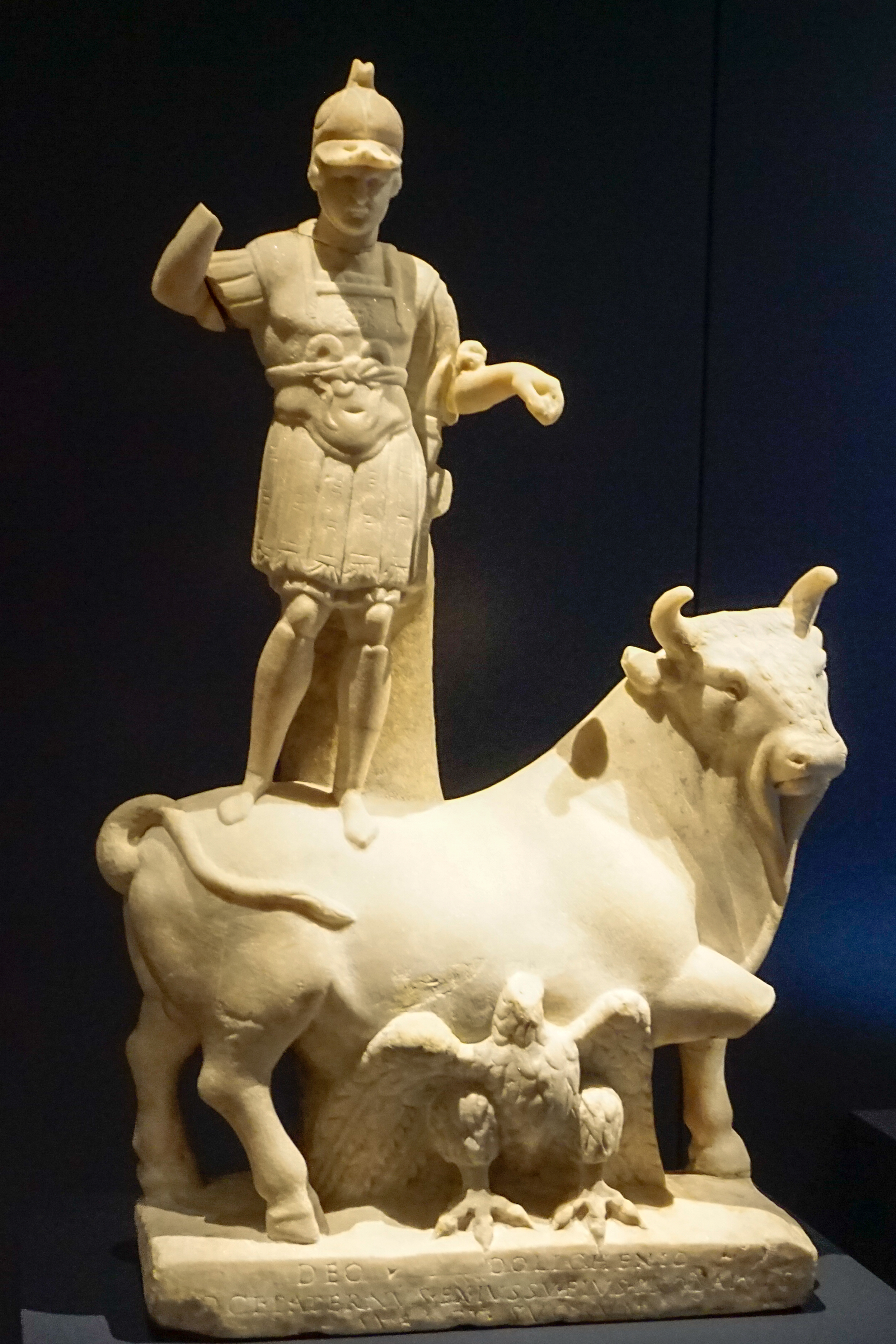 Statue des Juppiter Dolichenus, Hafen von Marseille, Erste Hälfte des 3. Jahrhundert. In der Kunstkammer im Landesmuseum Württemberg, Stuttgart